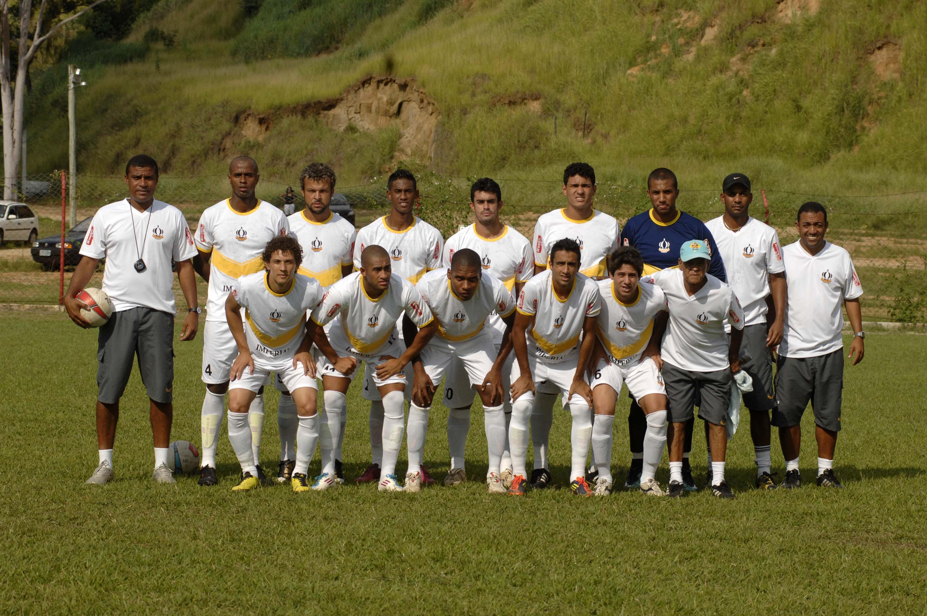 Equipe profissional do Imperial FC em 2012 na disputa do Campeonato Estadual da Série B. Foto cedida gentilmente pelo assessor de imprensa Gustavo Soares